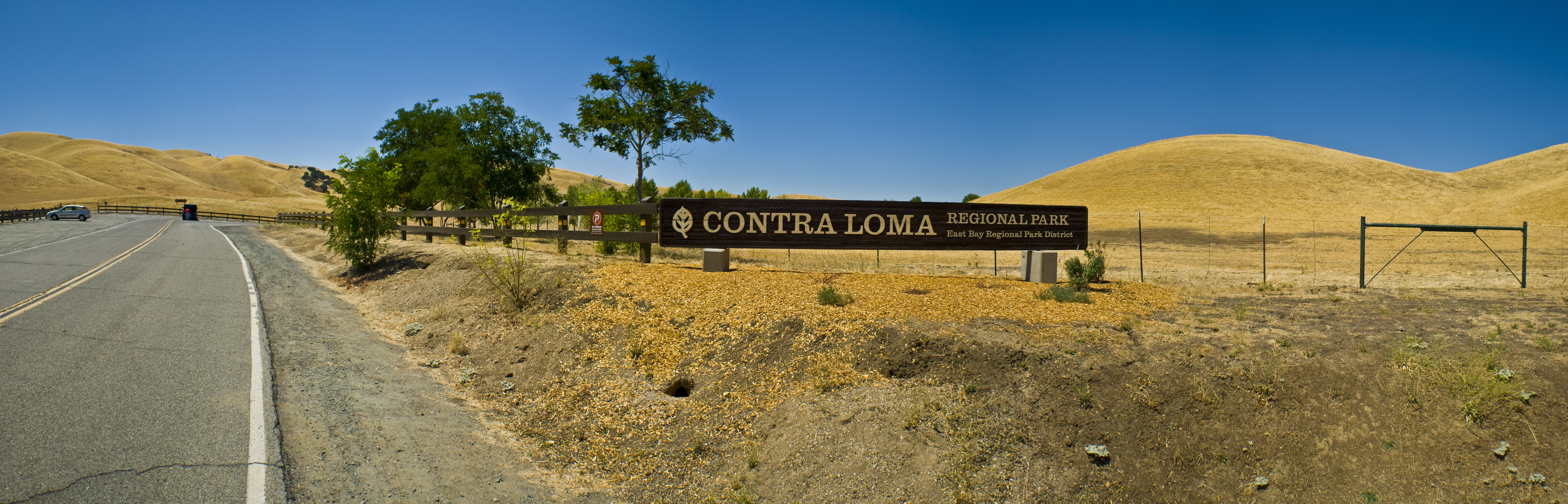 Contra Loma